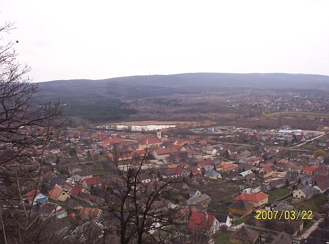 Felsőgalla látképe (Tatabánya)